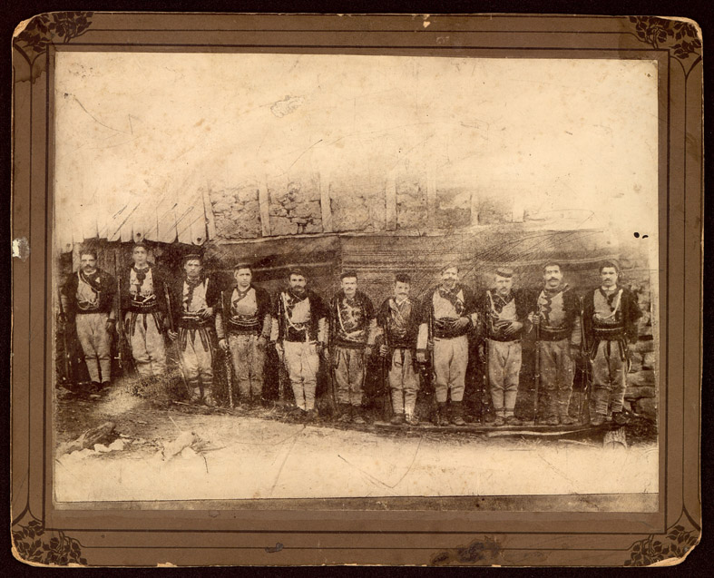 Struga IMARO Band